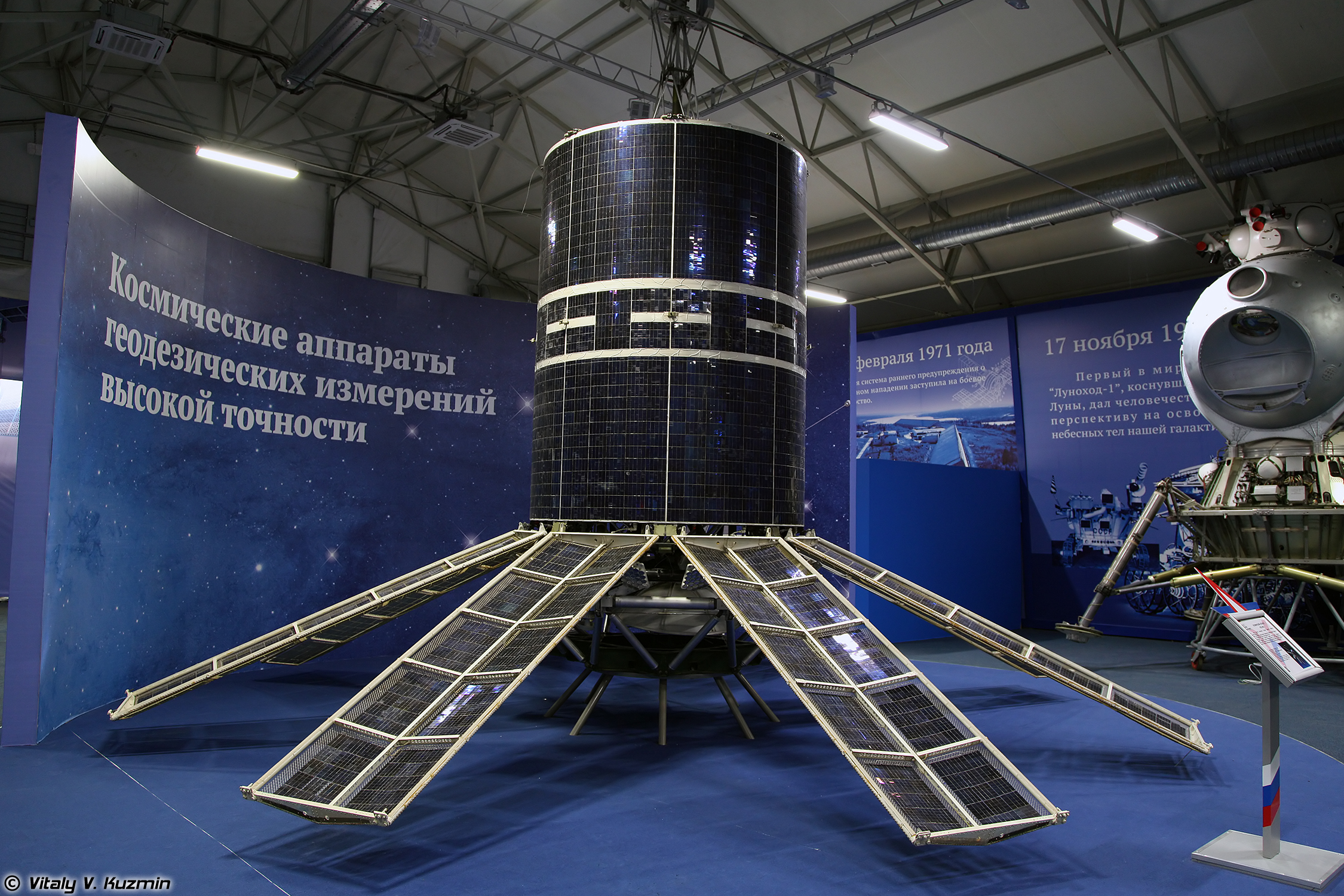 Космический аппарат ГЕО-ИК (GEO-IK spacecraft)